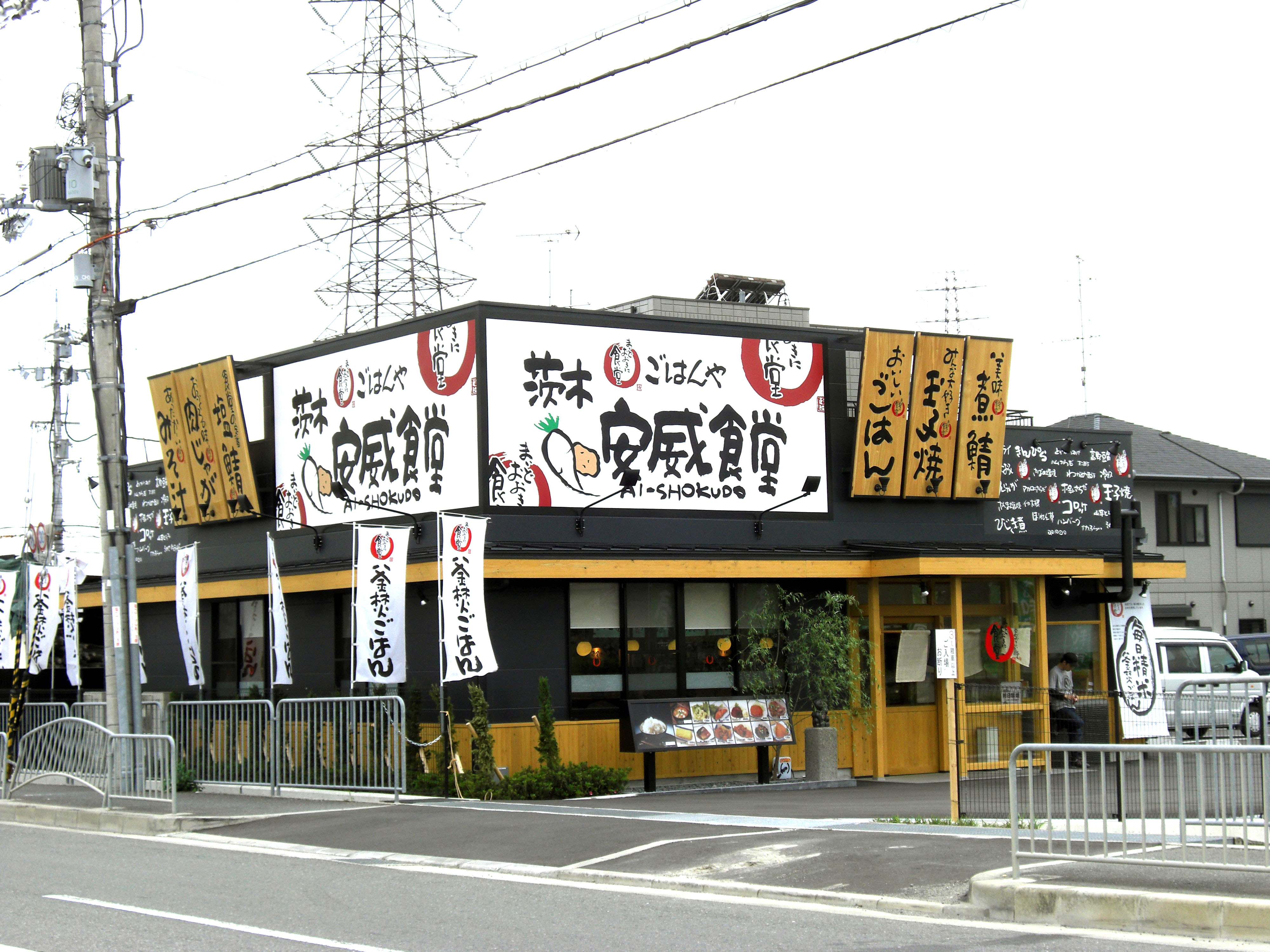 Ibaraki Ai Shokudo,Ai Ibarakishi-shi Osaka Japan.